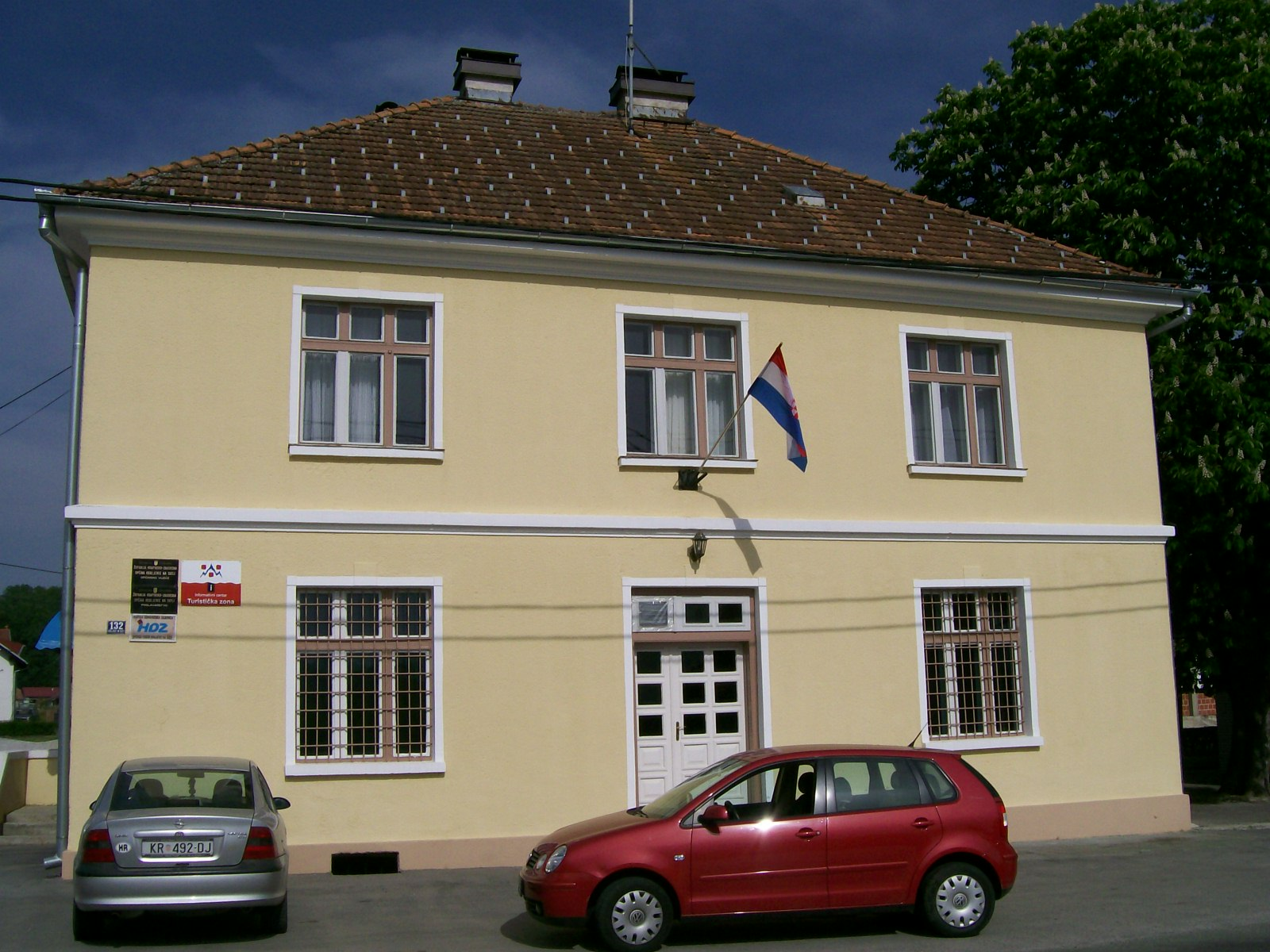 Općinska zgrada u Kraljevcu na Sutli, Krapinsko-zagorska županija